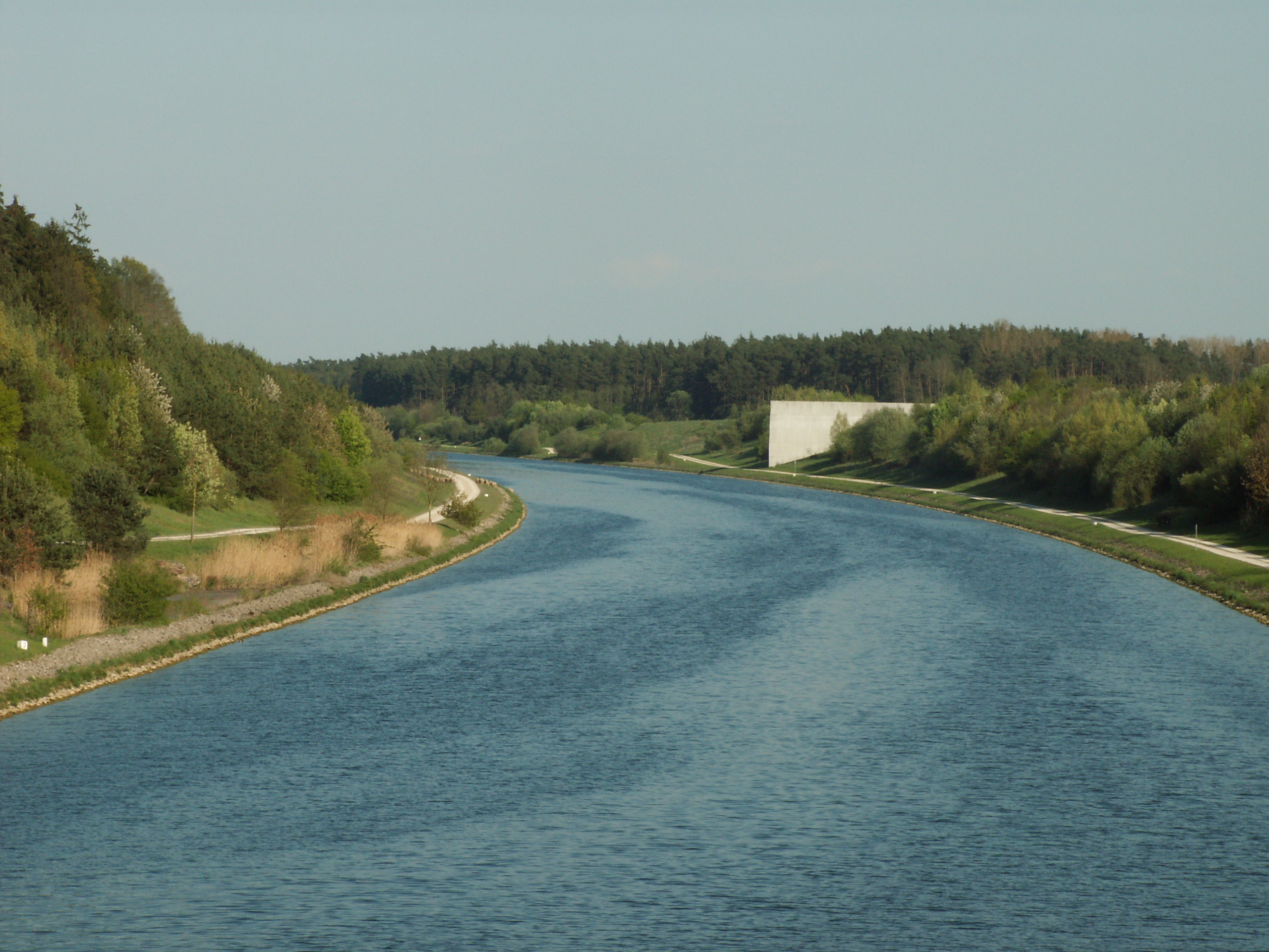 Denkmal Scheitelhaltung von Hannsjörg Voth am Main-Donau-Kanal (etwa 14 m hoher Abbruch des südlichen von 2 Mauerteilen).